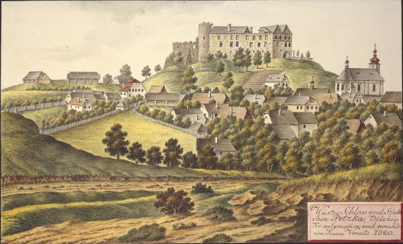 Pecka (hrad). Wüstes Schloss und Städtchen Petzka, Bidcžow Kr. aufgenomen und gemahlt von Joann Venuto 1820